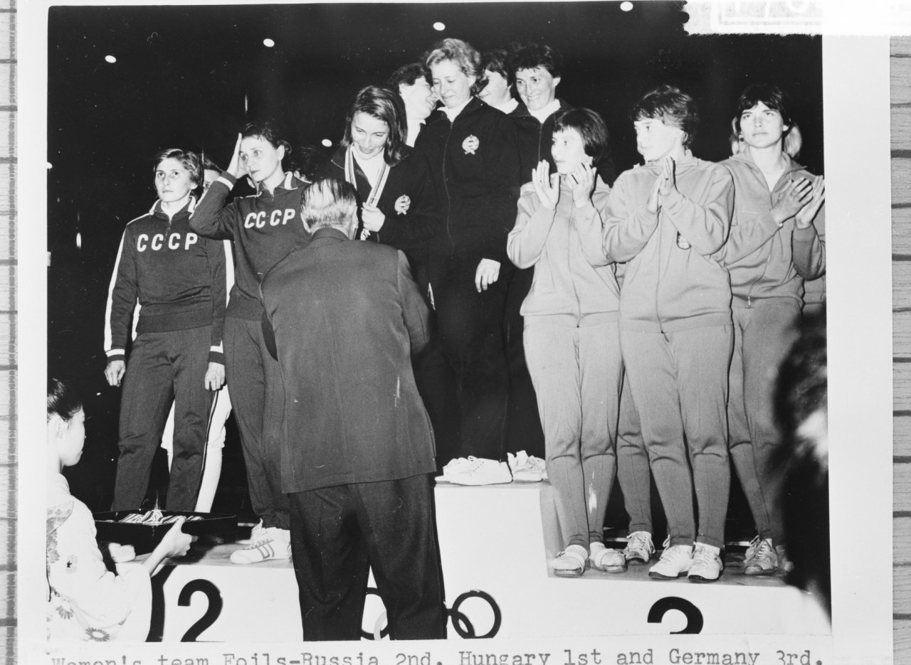 Olimpiai játékok Tokió, női tőr, Oroszország, Magyarország, NSZK. A győztes magyar csapat tagjai: Ágoston Judit, Dömölky Lídia, Juhász Katalin, Marosi Paula, Rejtő Ildikó